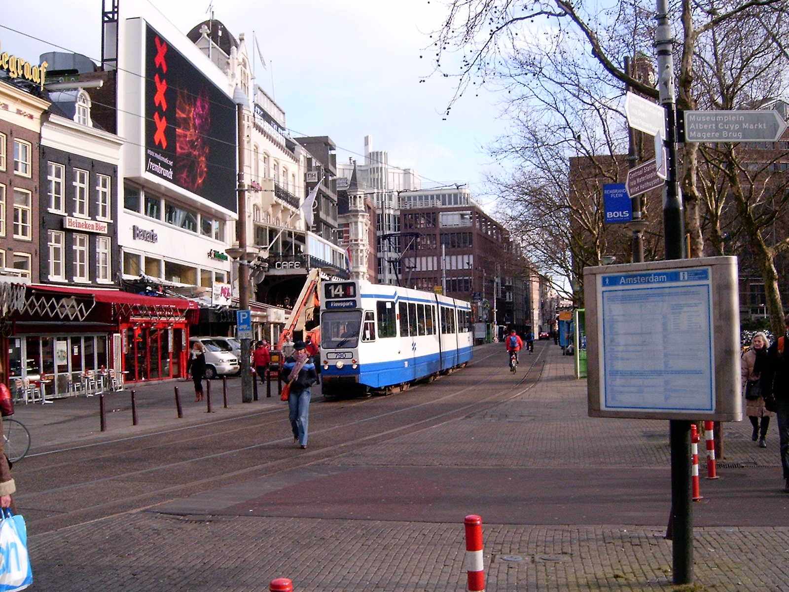 Rembrandtplein in Amsterdam - Categorie:Afbeelding tram